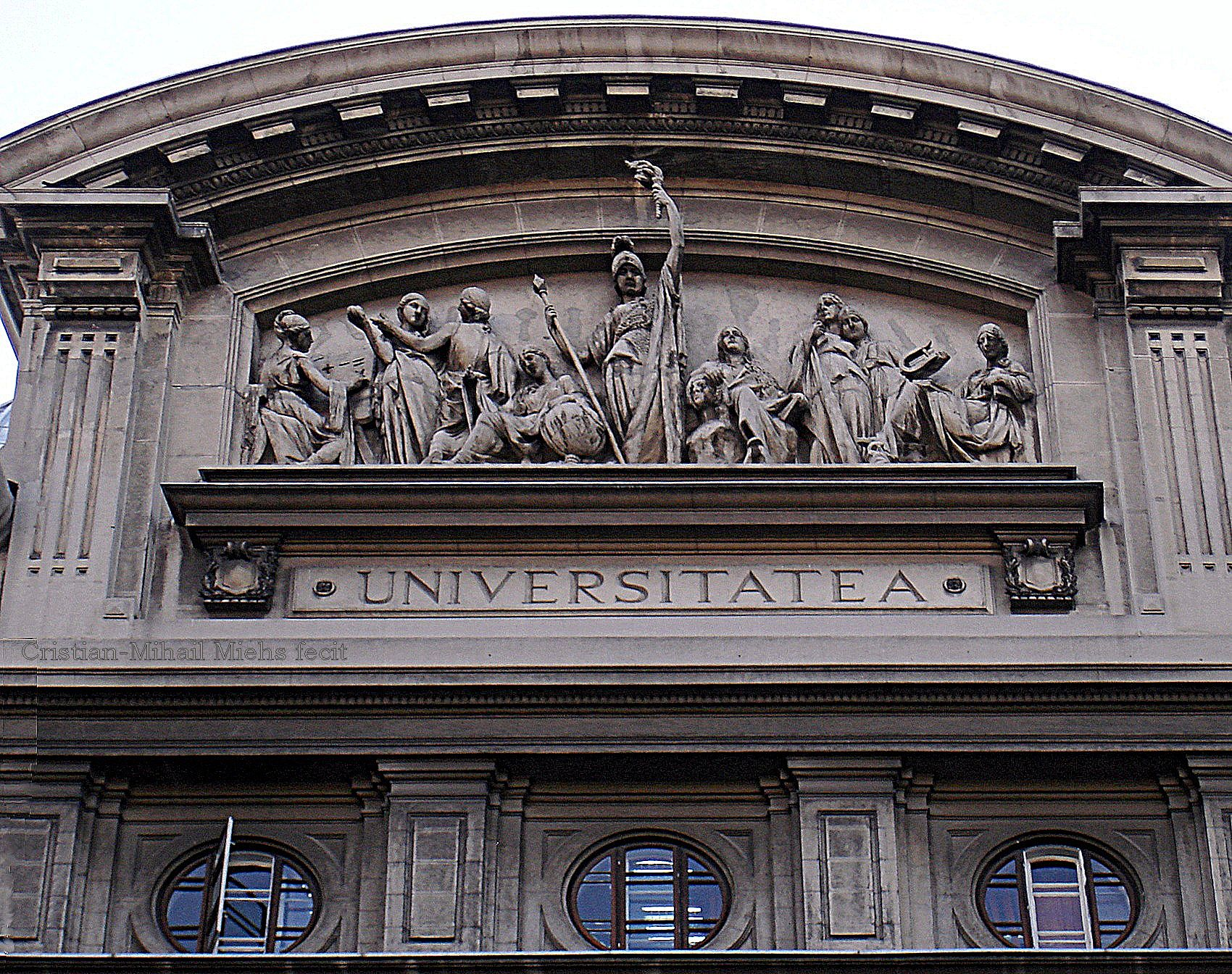 Frontonul se deasupra intrării din spate a Universităţii din Bucureşti.